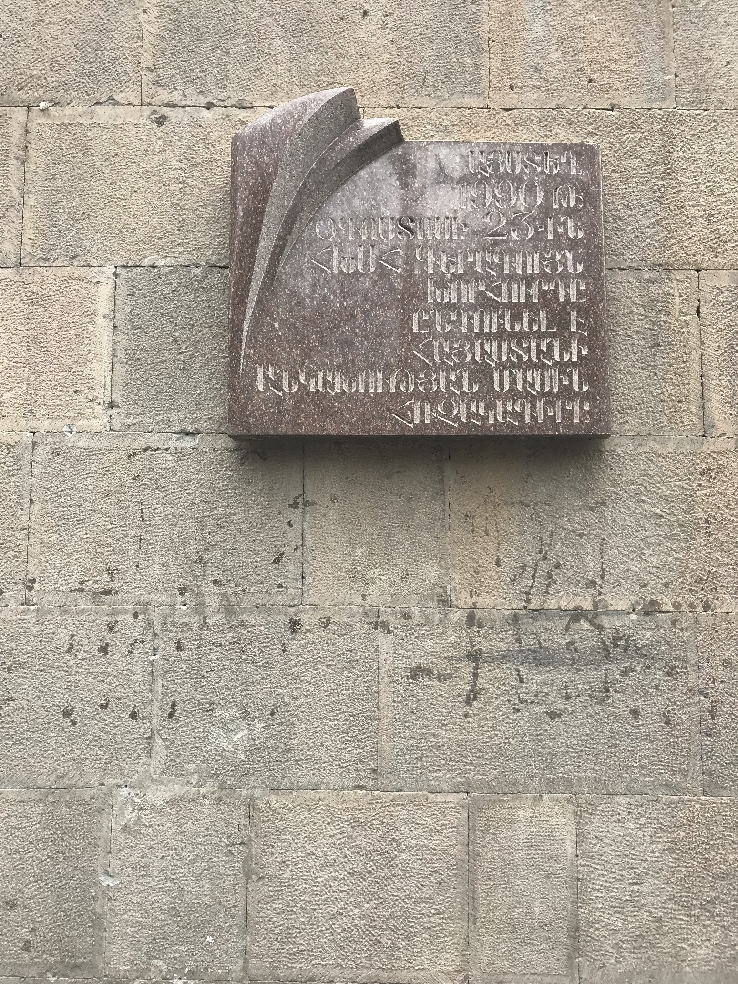 Journée du 13 mai 2018 à Erevan (Arménie).